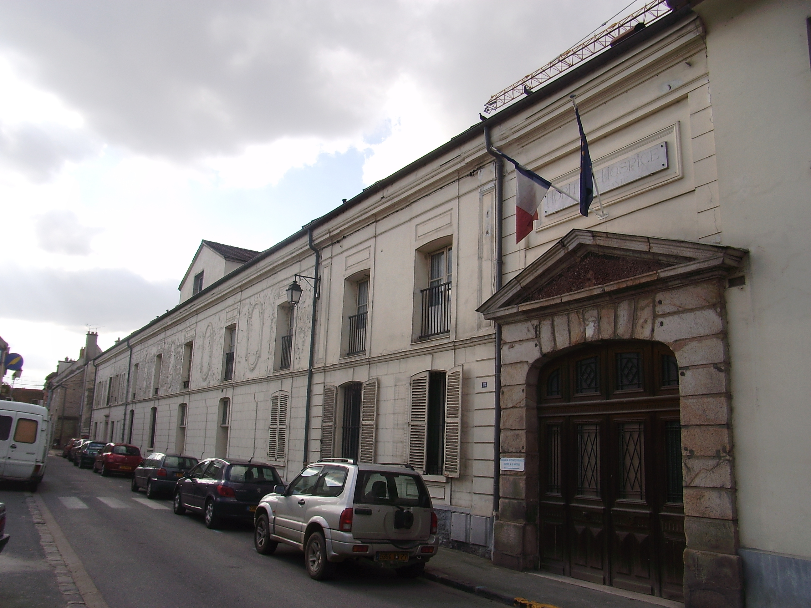 Maison de retraite de La Ferté-Alais (91)